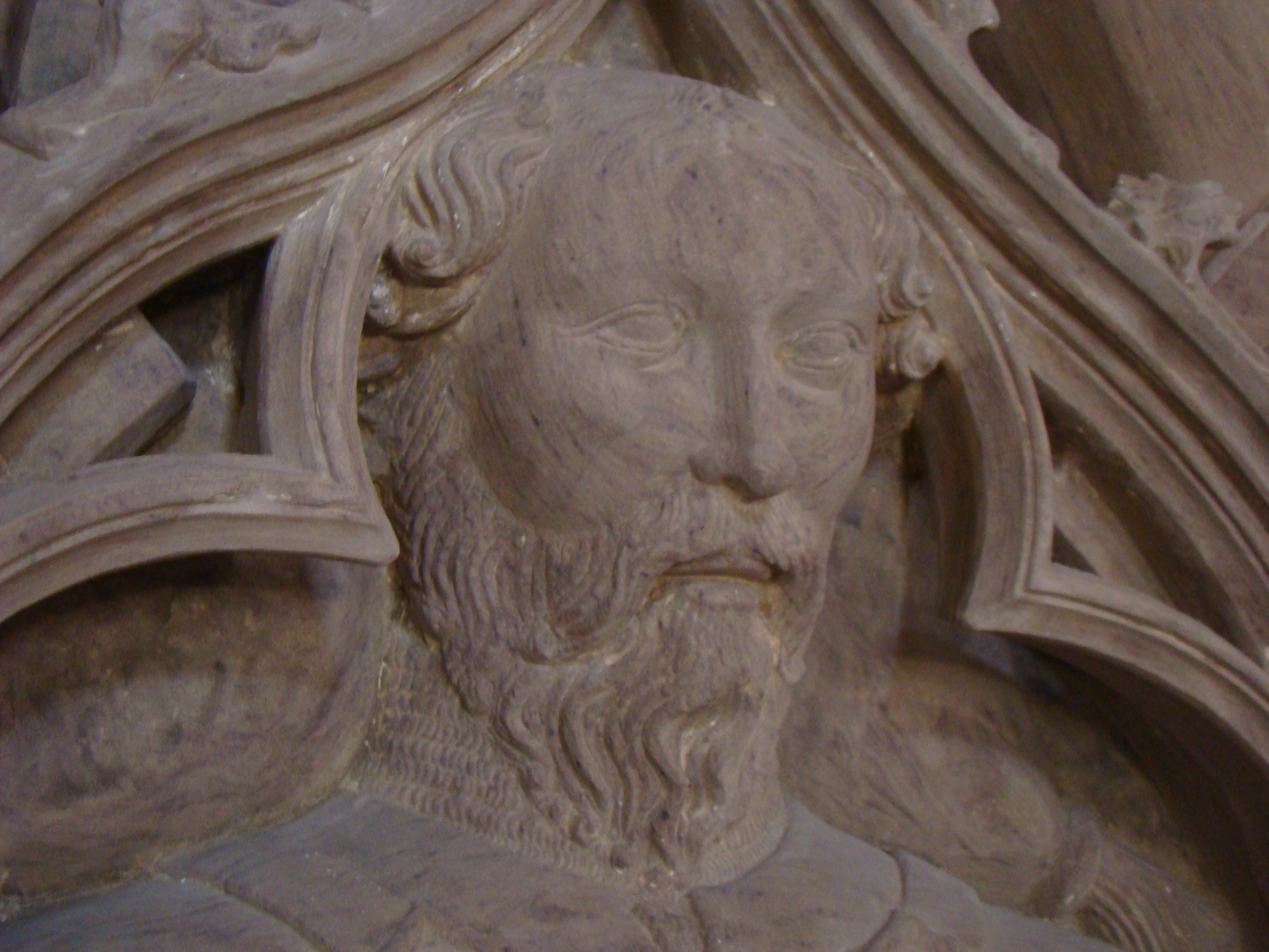 Detail vom Epitaph des Weiprecht I. von Helmstatt in der Totenkirche Neckarbischofsheim